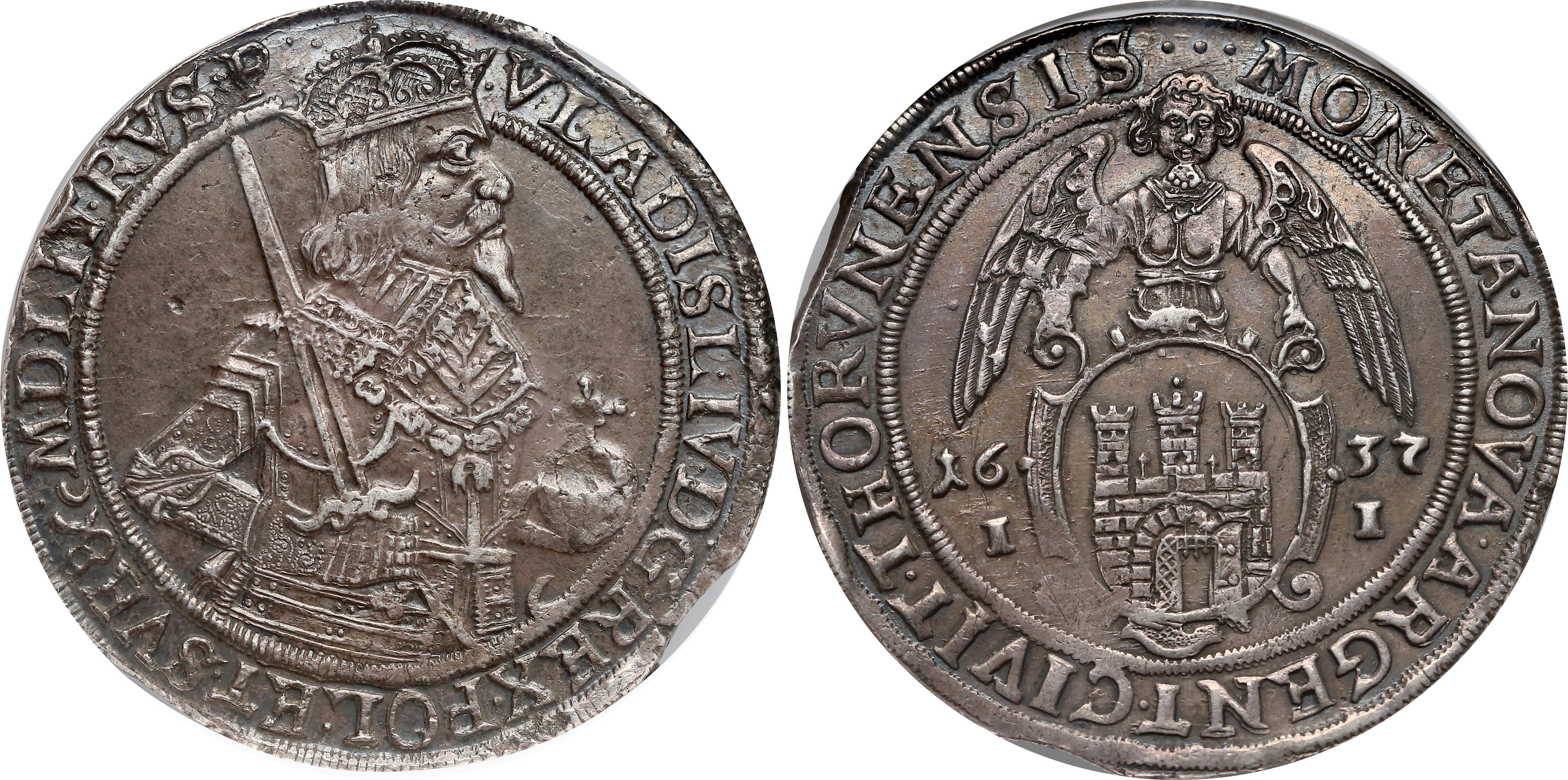 Talar miejski Toruń 1637